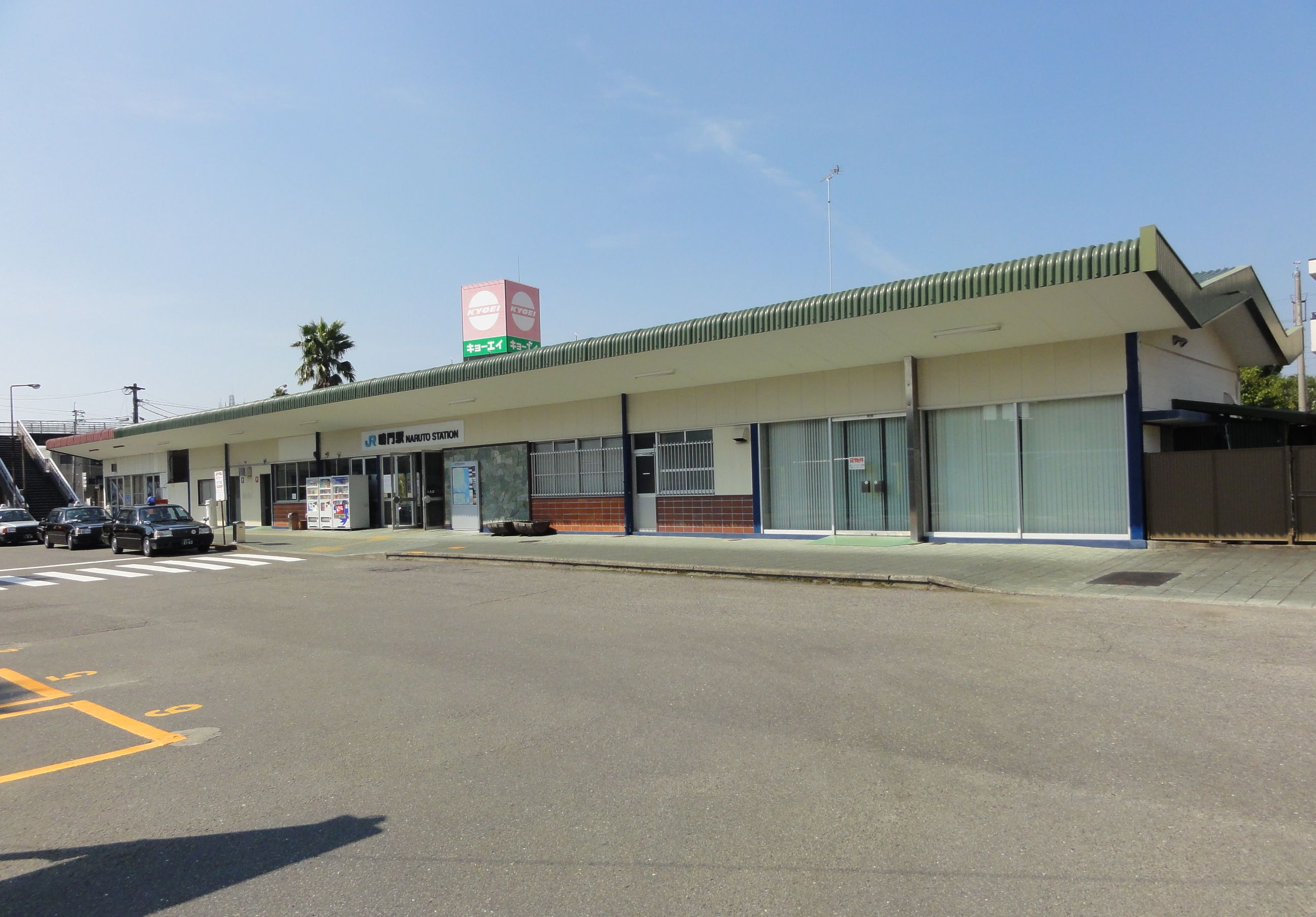 鳴門駅